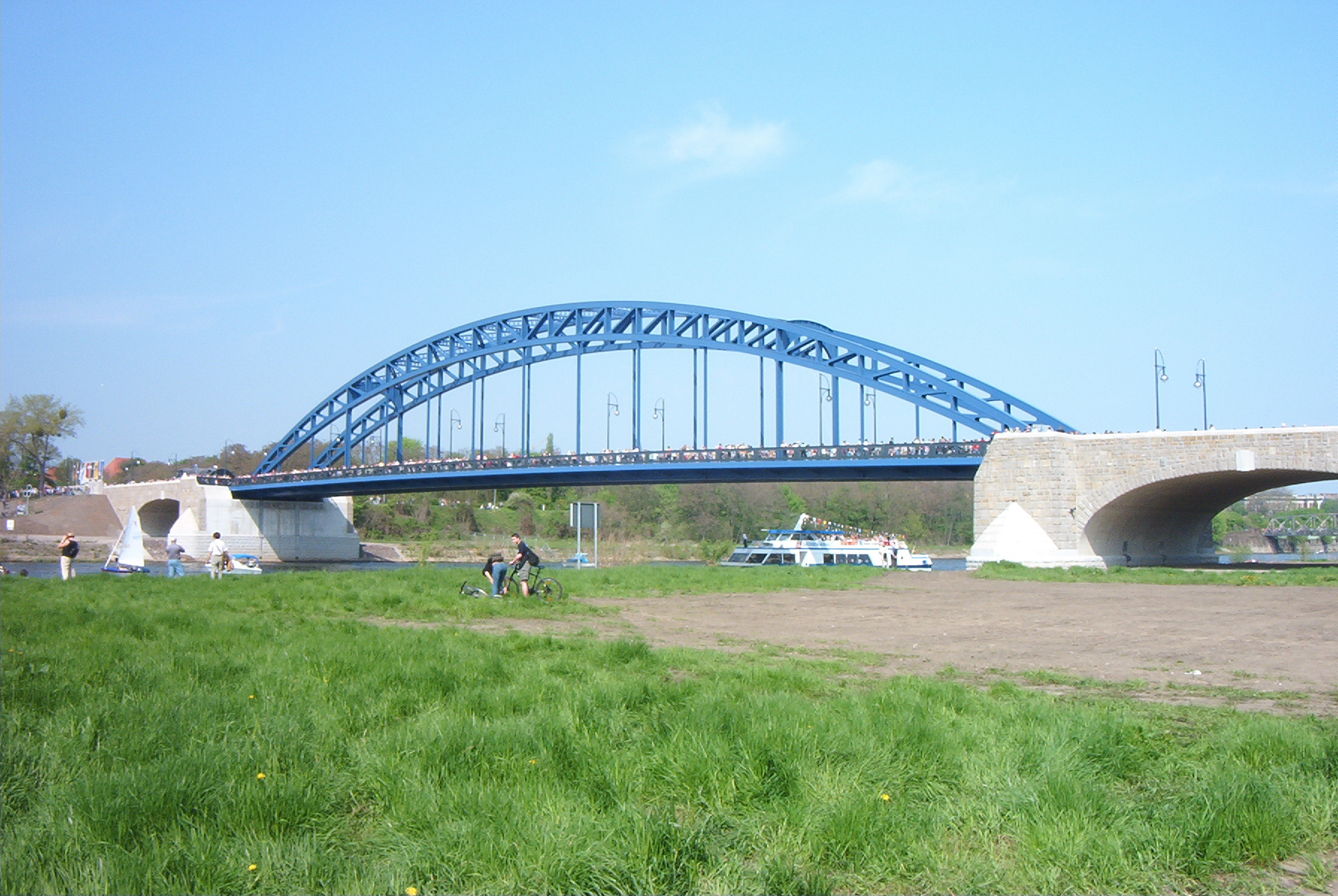 Sternbrücke Magdeburg am Tag der Eröffnung, selbst aufgenommen am 1.5.2005